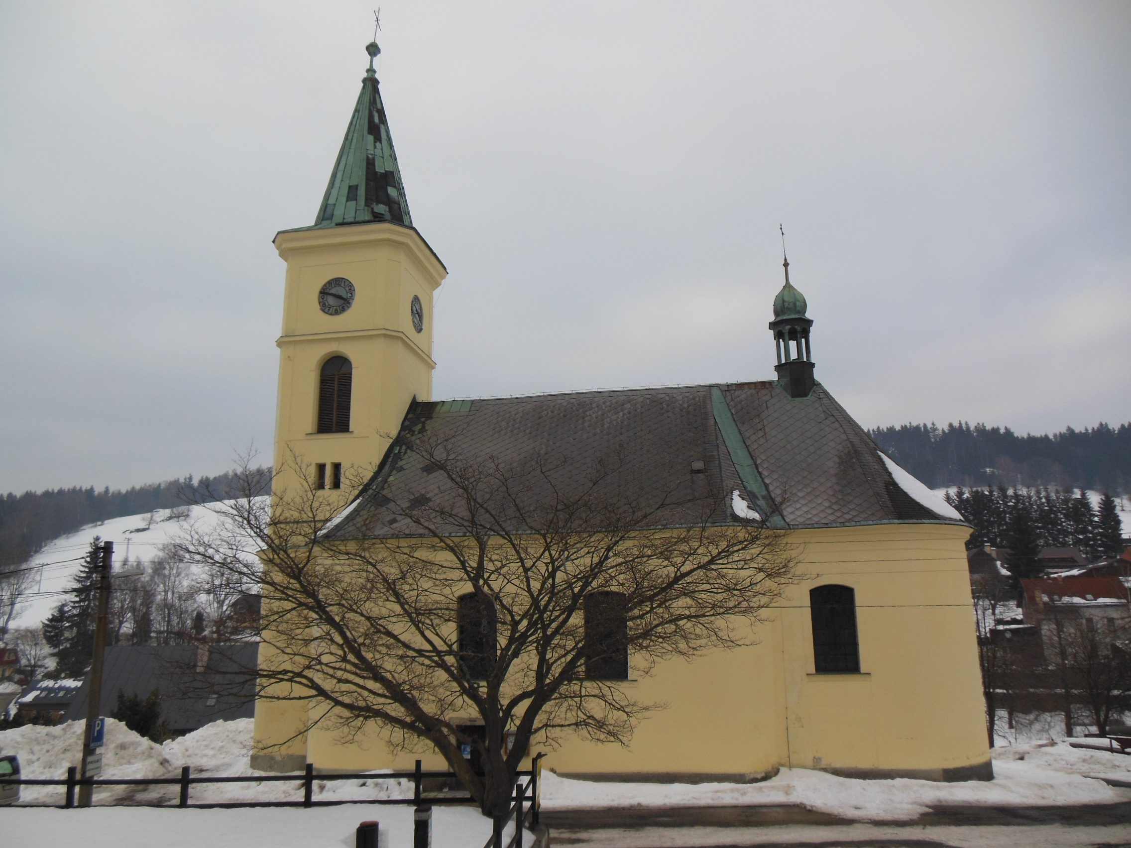 Barokní kostel sv. Františka z Pauly z let 1779-1784.